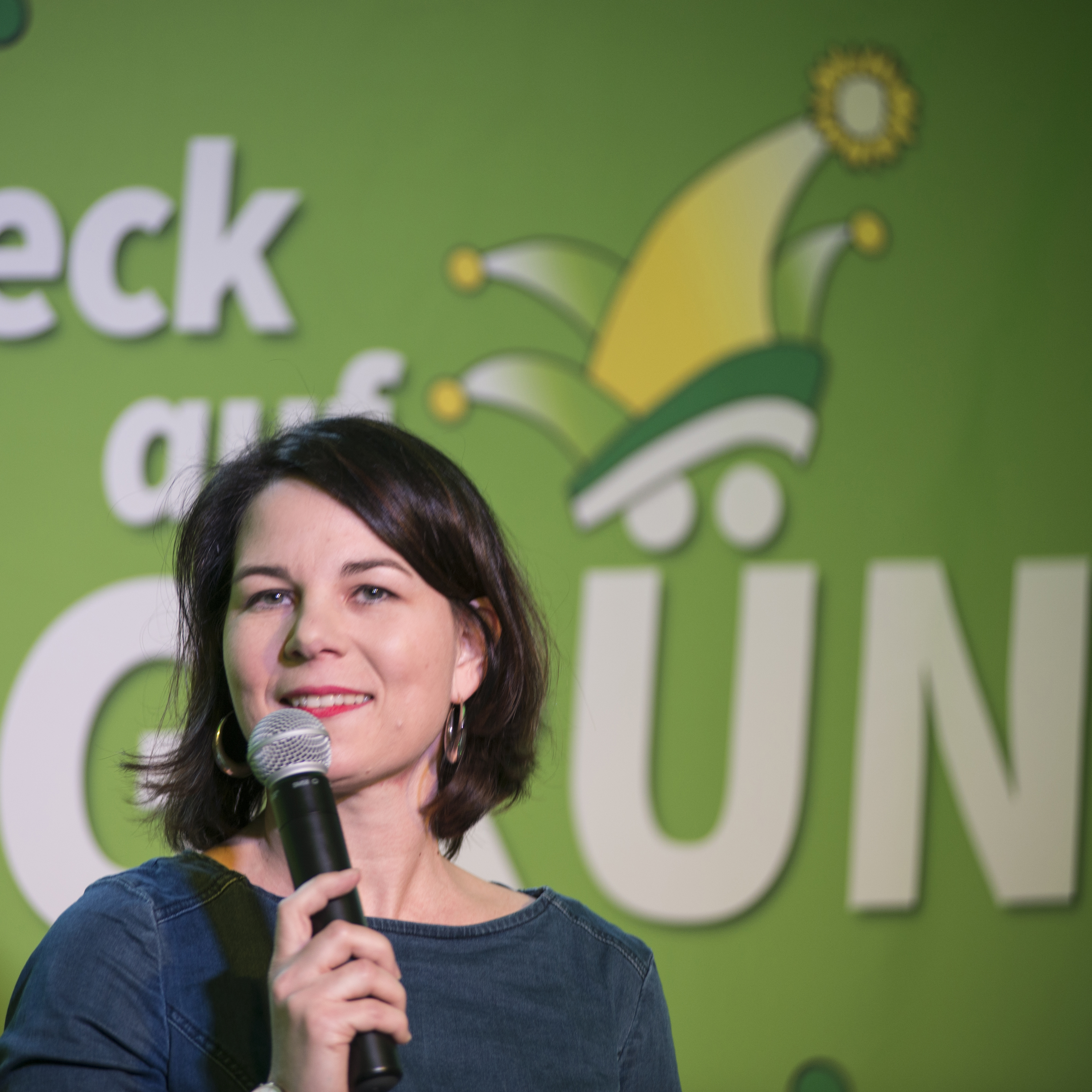 Annalena Baerbock beim politischen Aschermittwoch 2018 in Köln